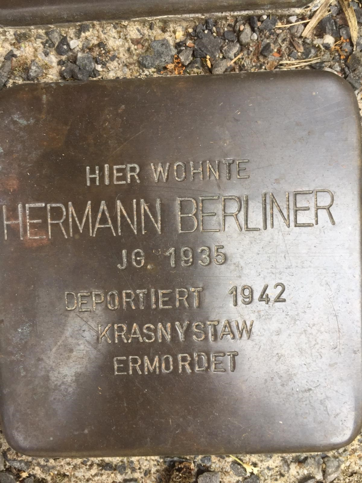 Stolperstein